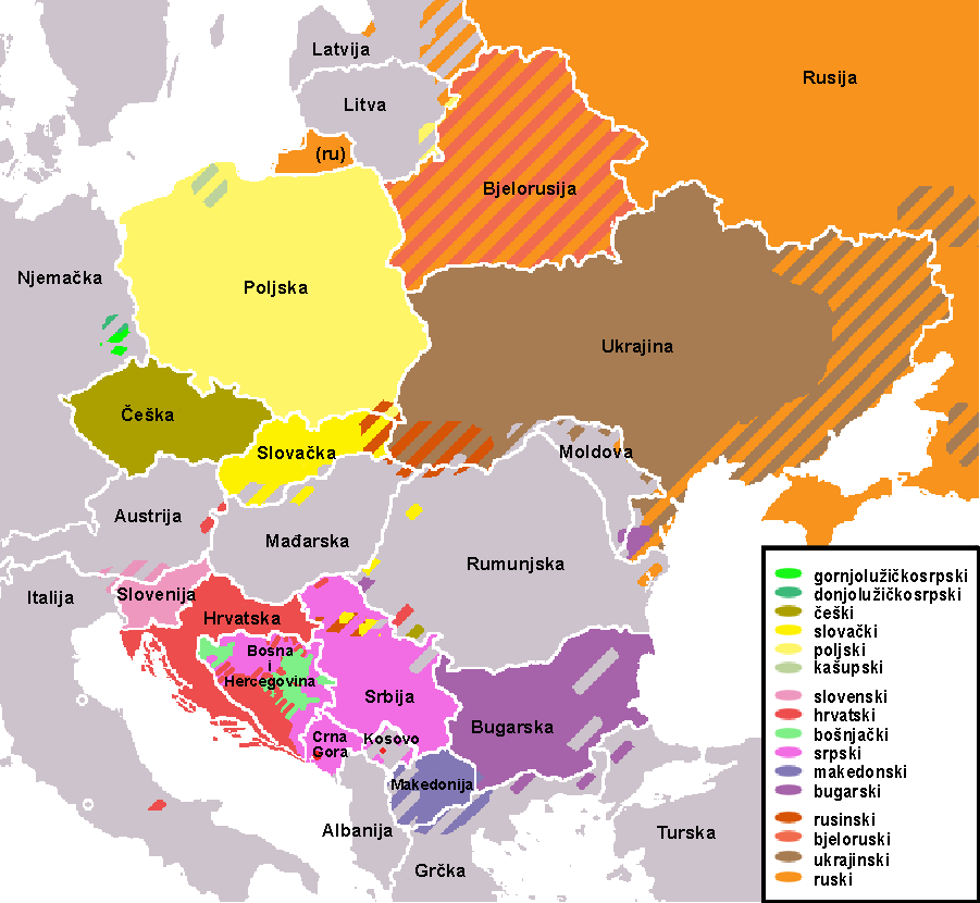 Rasprostranjenost slavenskih jezika